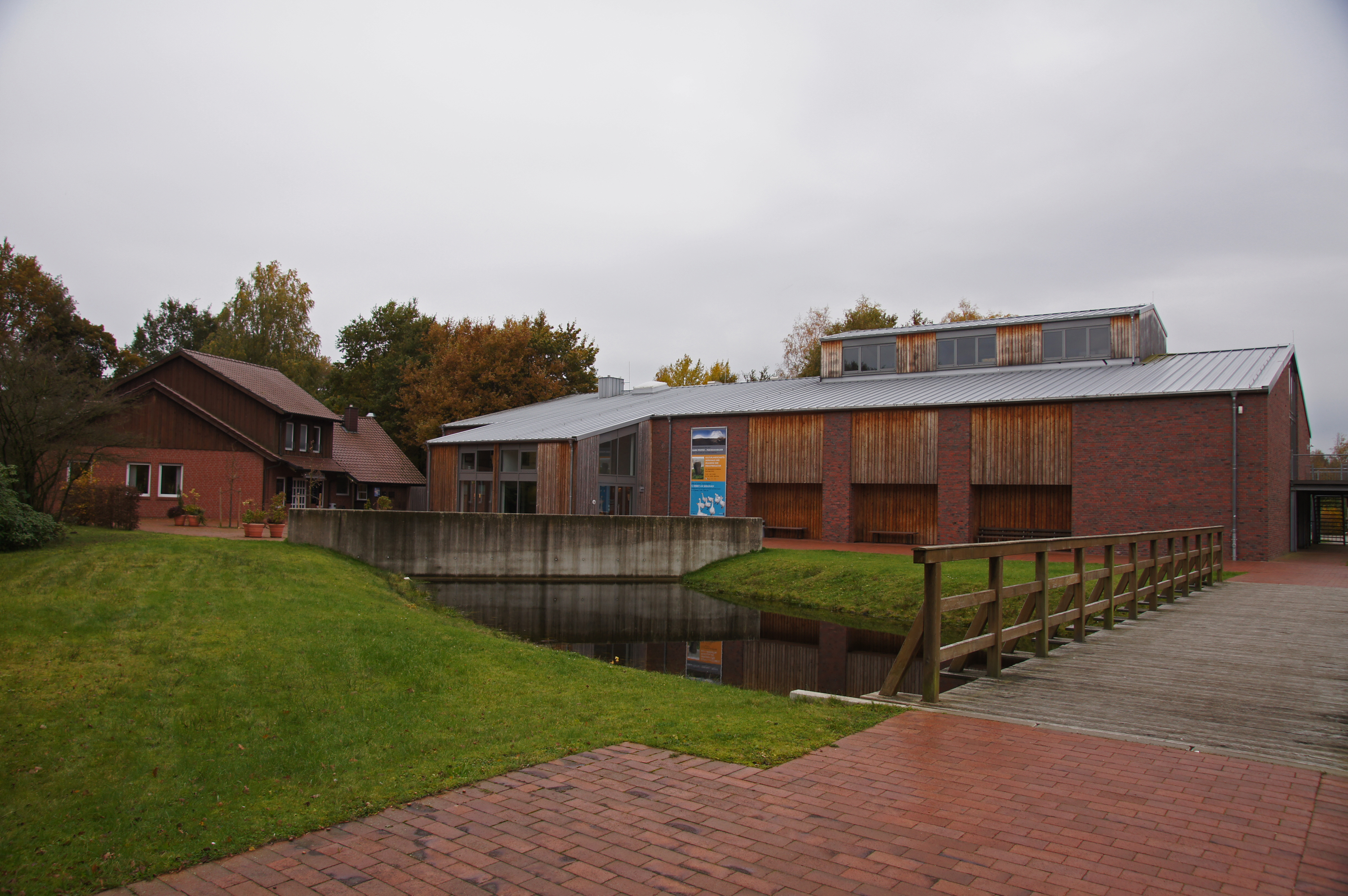 2010-10-30 Geeste, Moormuseum 001